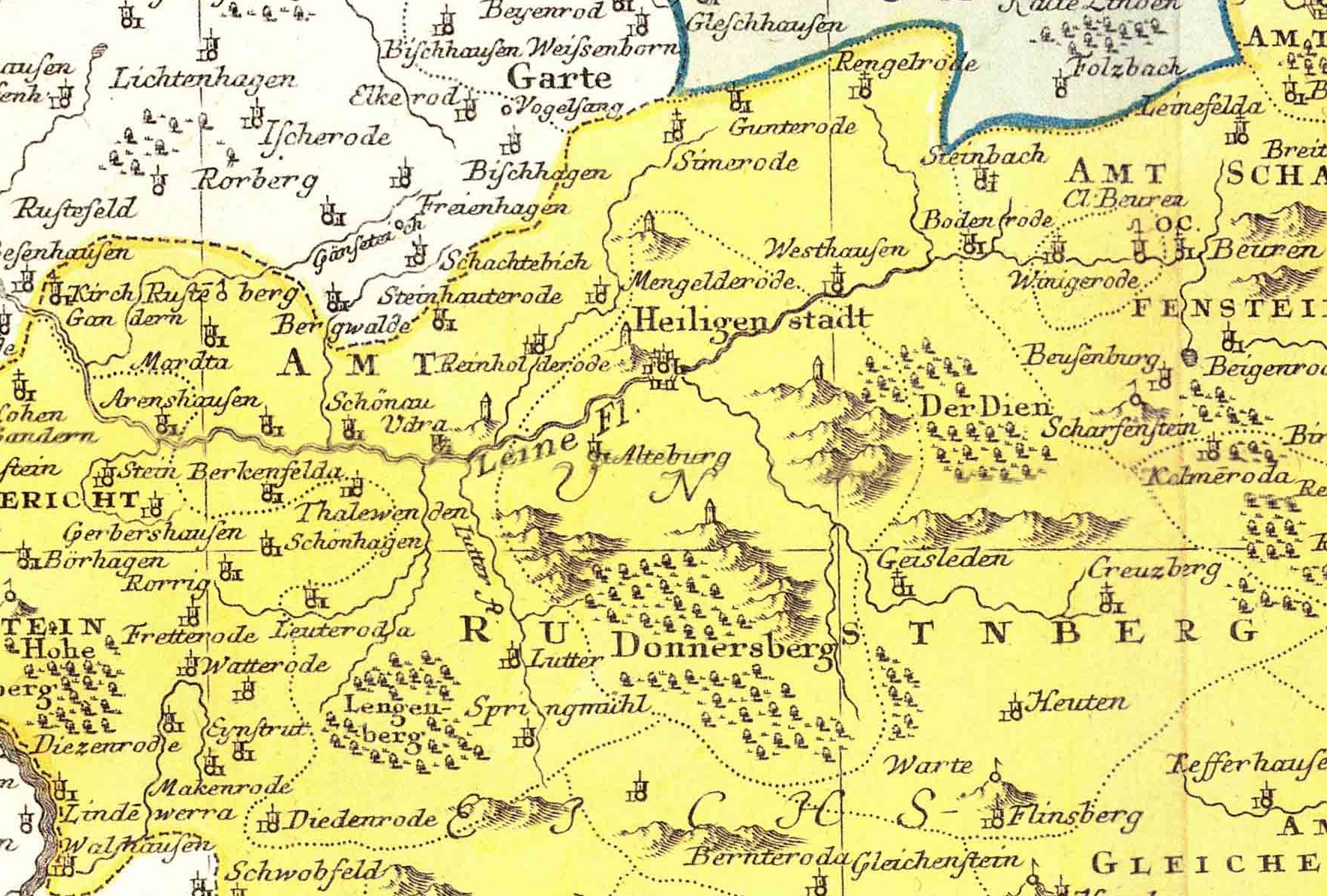 Ausschnitt aus der historischen Karte "Tractus Eichsfeldiae": das Amt Gleichenstein Die Karte weist folgende Fehler auf: Die Grenze zwischen dem Calenbergischen und dem Heiligenstädter Gebiet ist zu weit südlich eingezeichnet: somit liegen die zum Eichsfeld gehörenden Dörfer Rorberg (Rohrberg), Bergwalde (Burgwalde), Bischhagen, Freienhagen und Schachtebich hier außerhalb des Eichsfelds Das Gut Besenhausen liegt außerhalb des Eichsfeldes